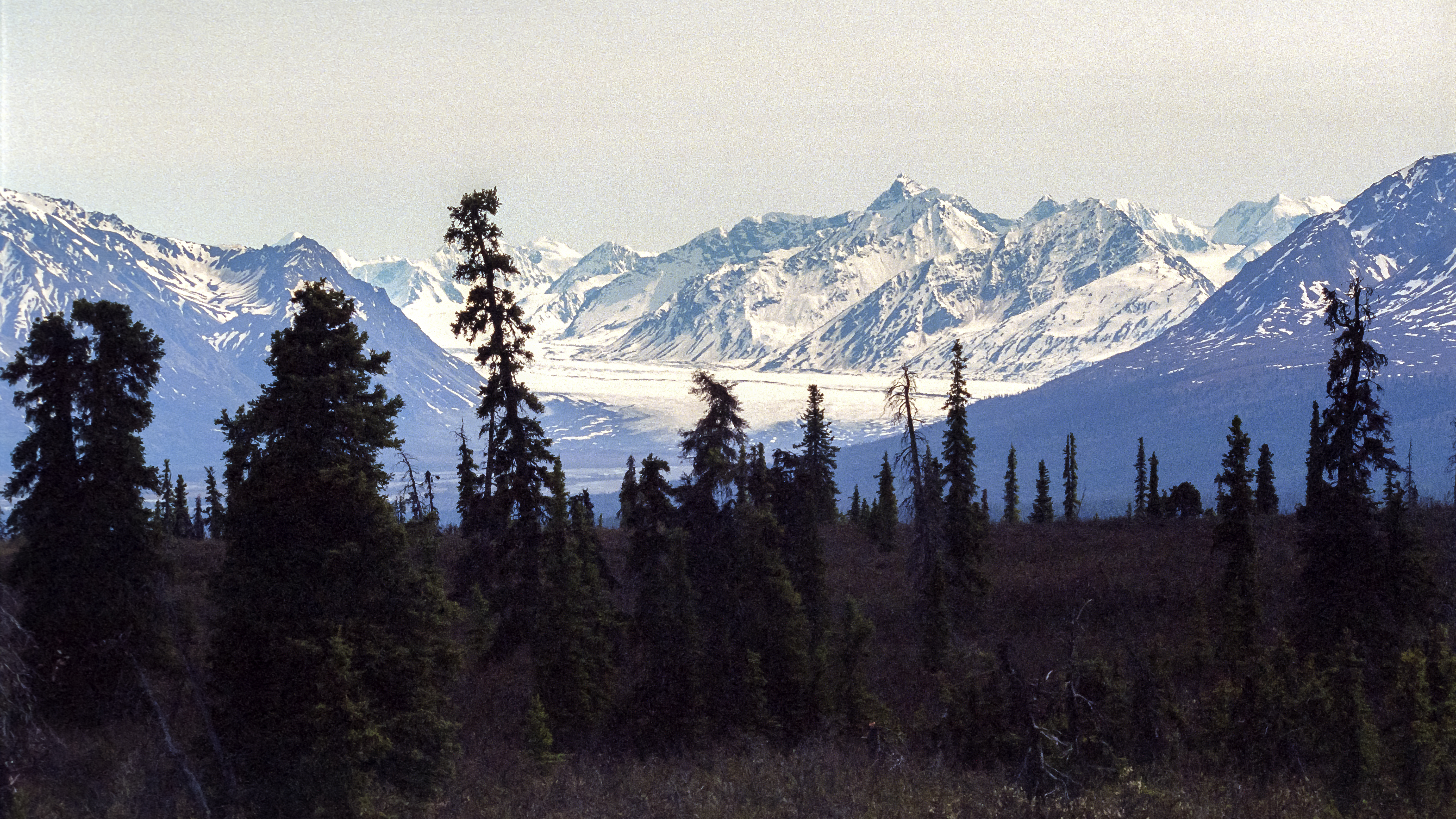 Matanuska Valley, Matanuska Glacier